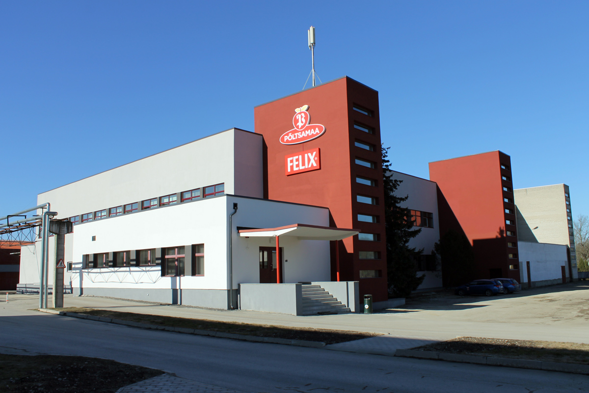 Põltsamaa Felixi kontor.